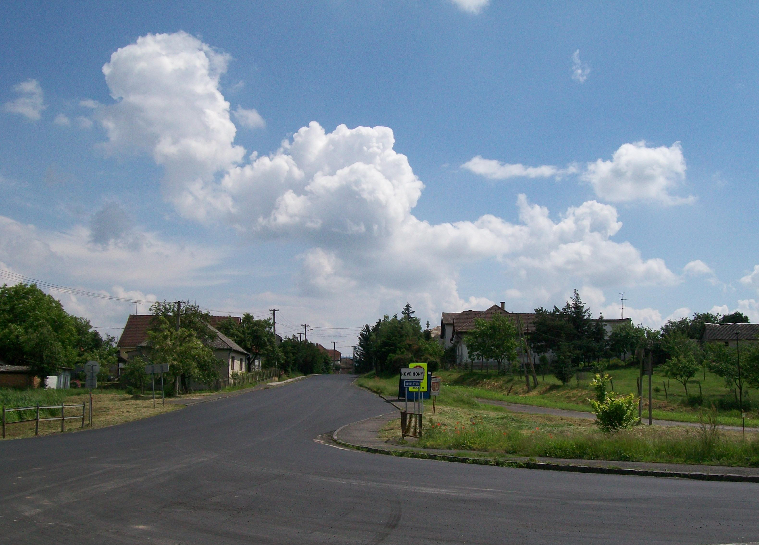 Križovatka v obci Nové Hony